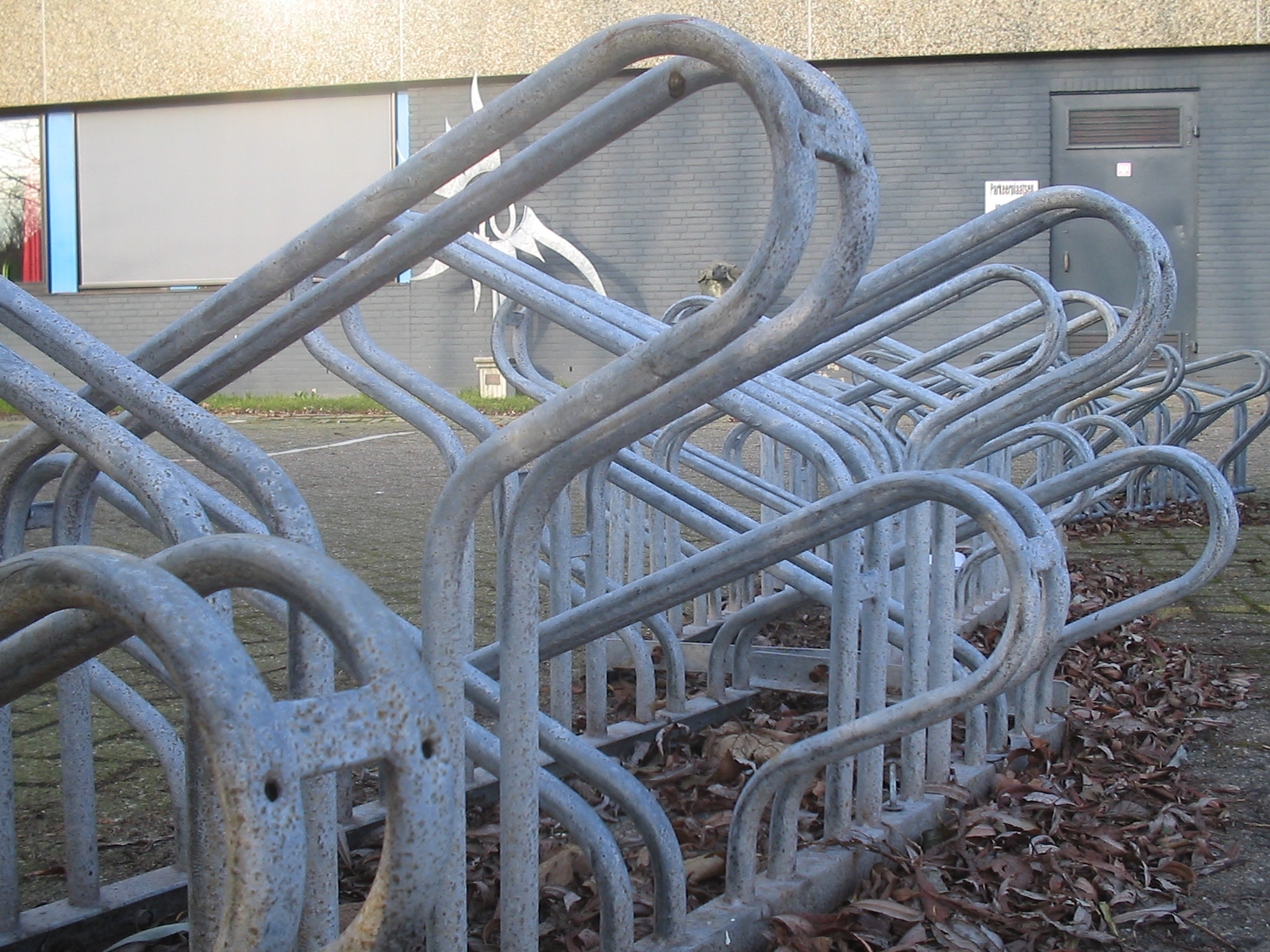 Fietsrek, Delft